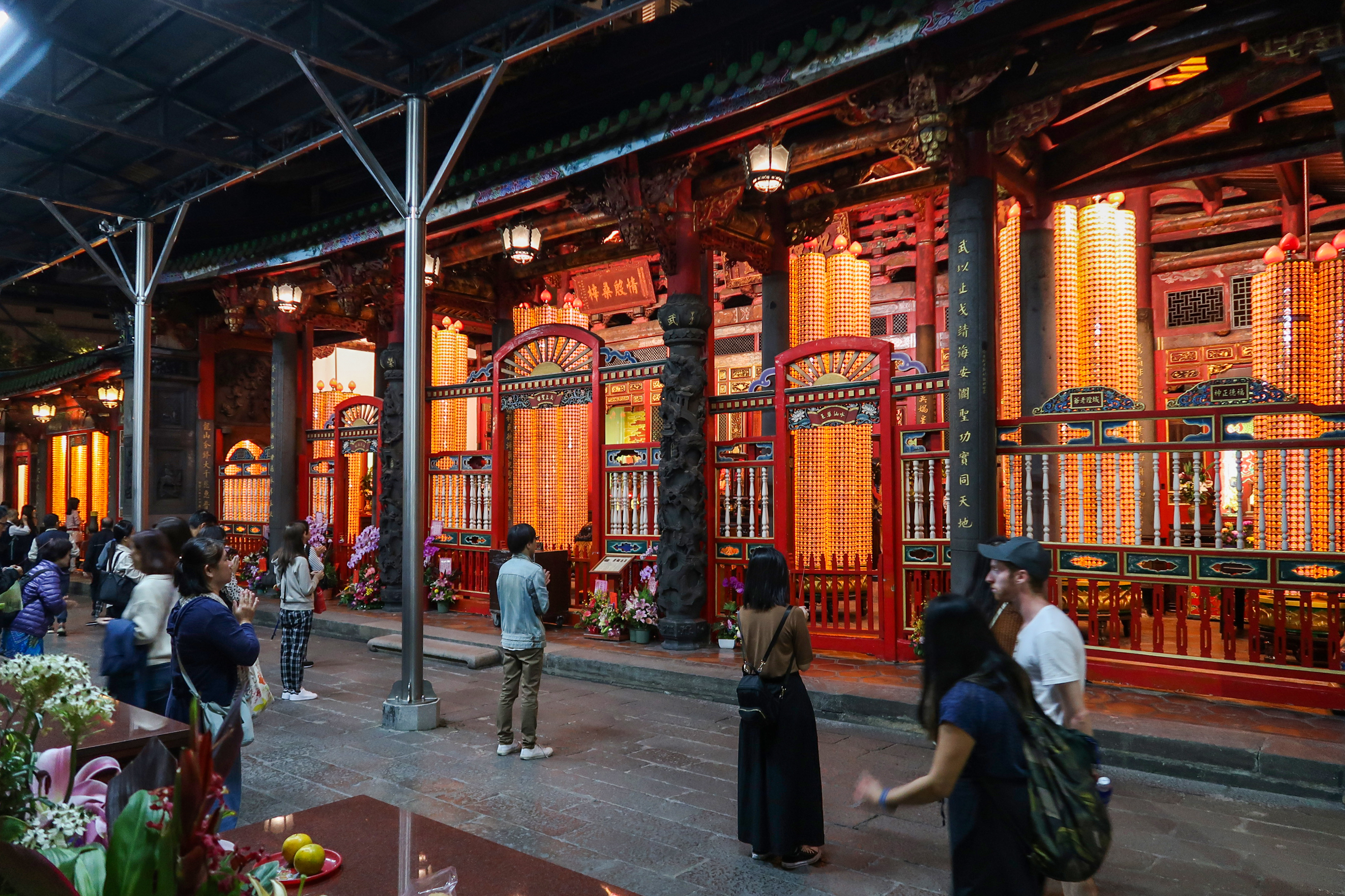 Mengjia Longshan Temple